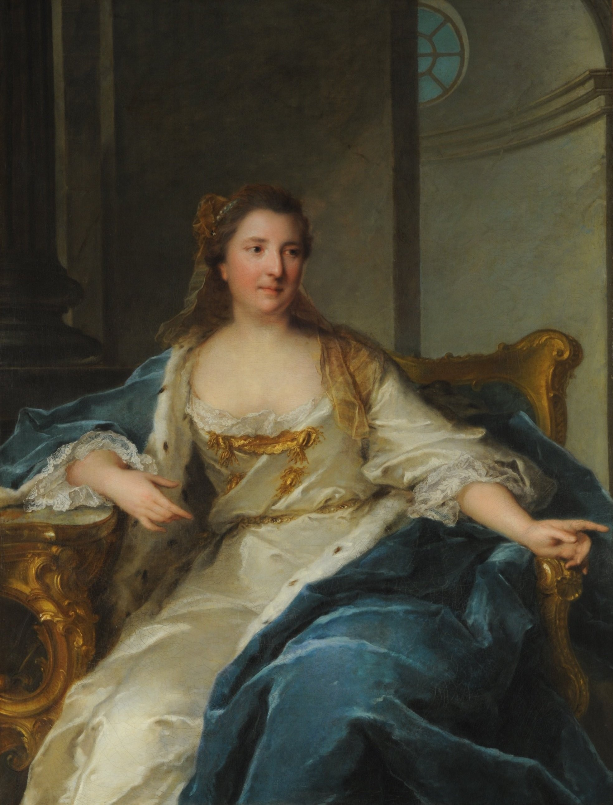 Portrait of Charlotte de Hesse-Rheinfels (1714-1741), Princess of Condé